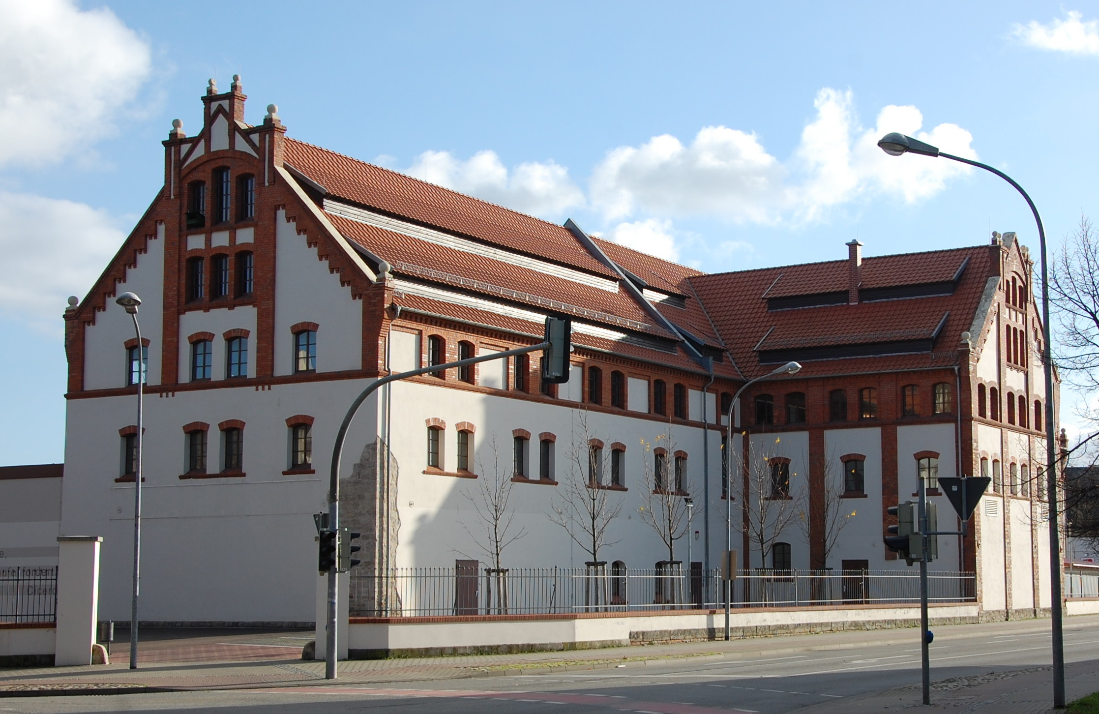 Gebäude im Harzweg in Quedlinburg